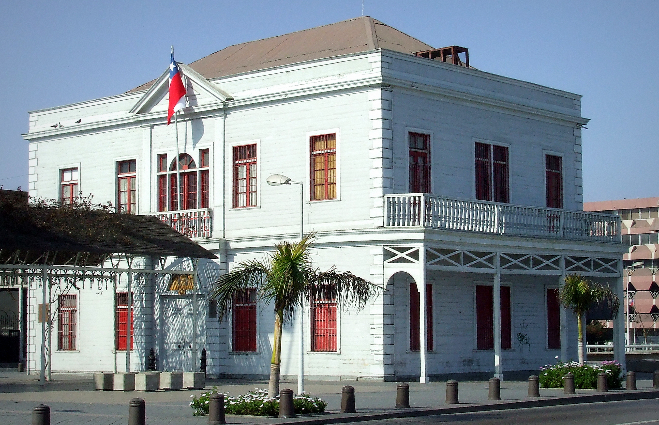 Gobernación Marítima de Antofagasta This is a photo of a national monument in Chile: 308